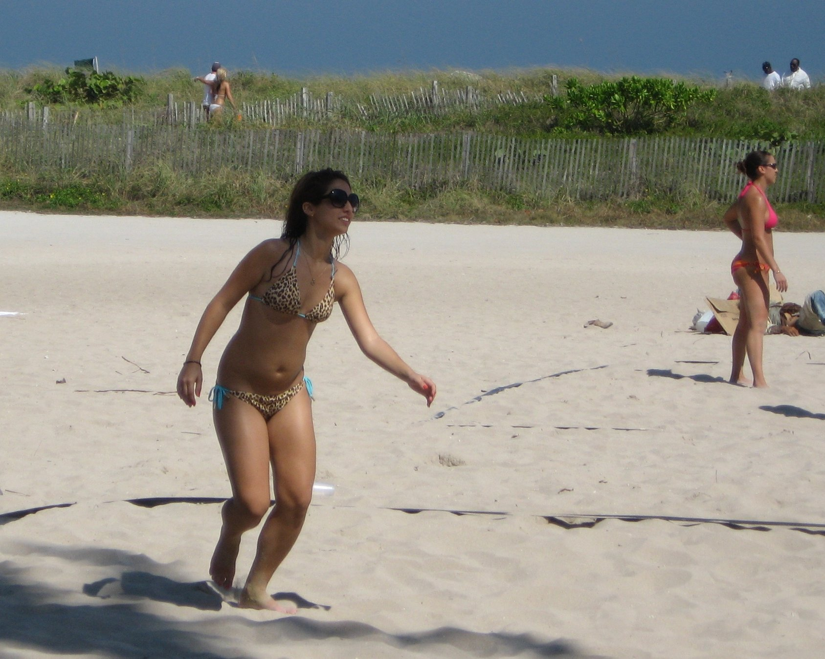 Hot girl in a bikini playing volleyball.